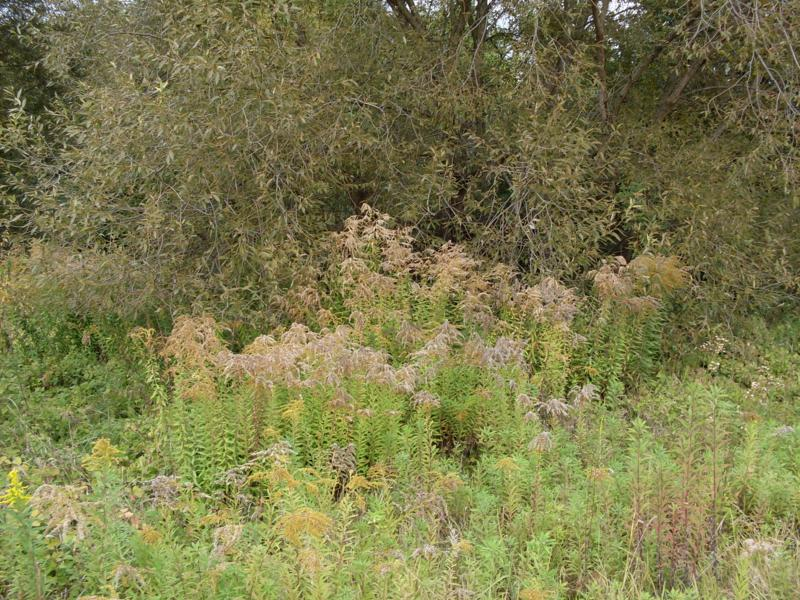 Magas aranyvessző (Solidago gigantea), Erdőtelki-égerláp